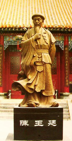 Estátua de Chen Wanting